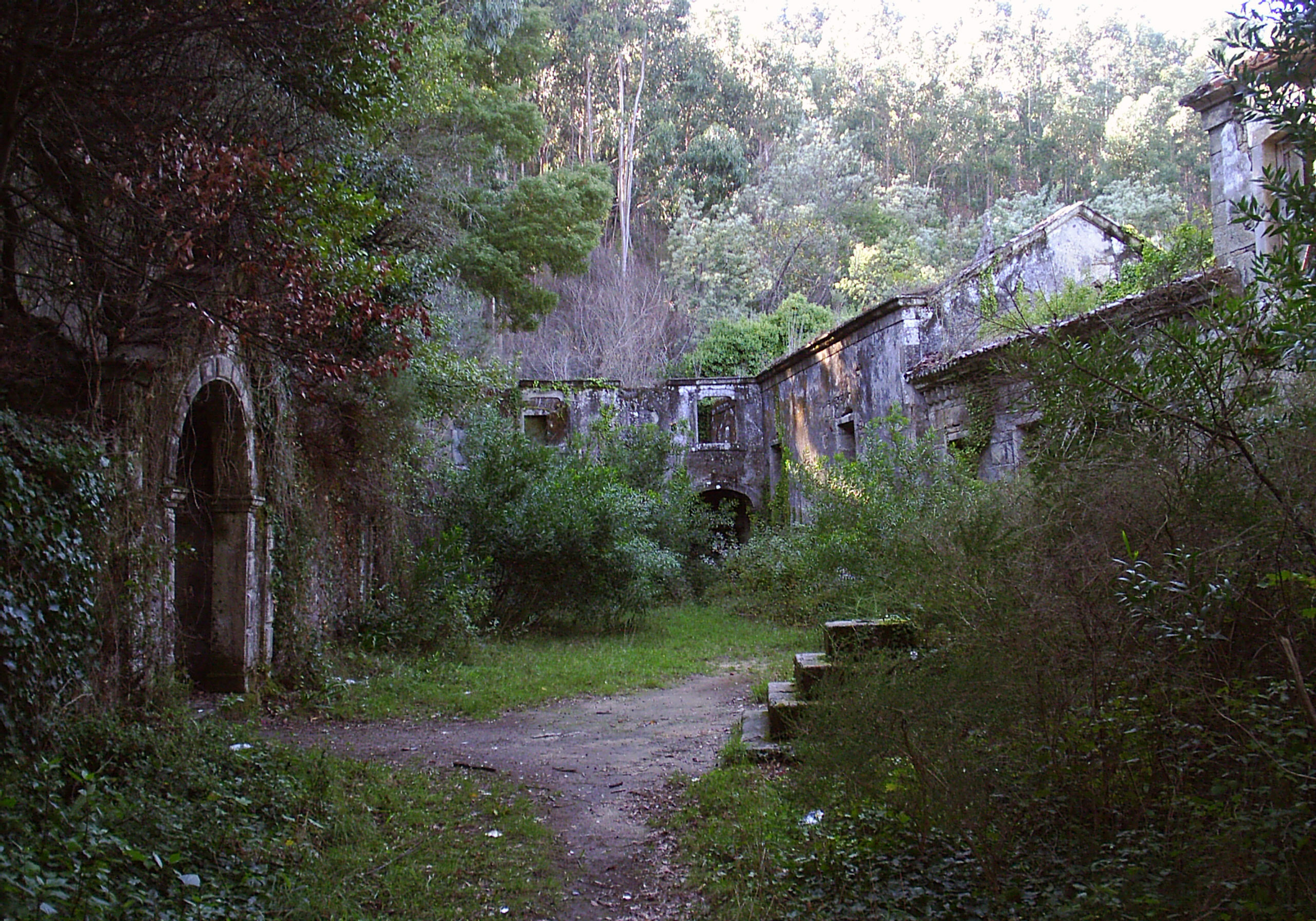 Foto do convento de são francisco do monte em viana do castelo